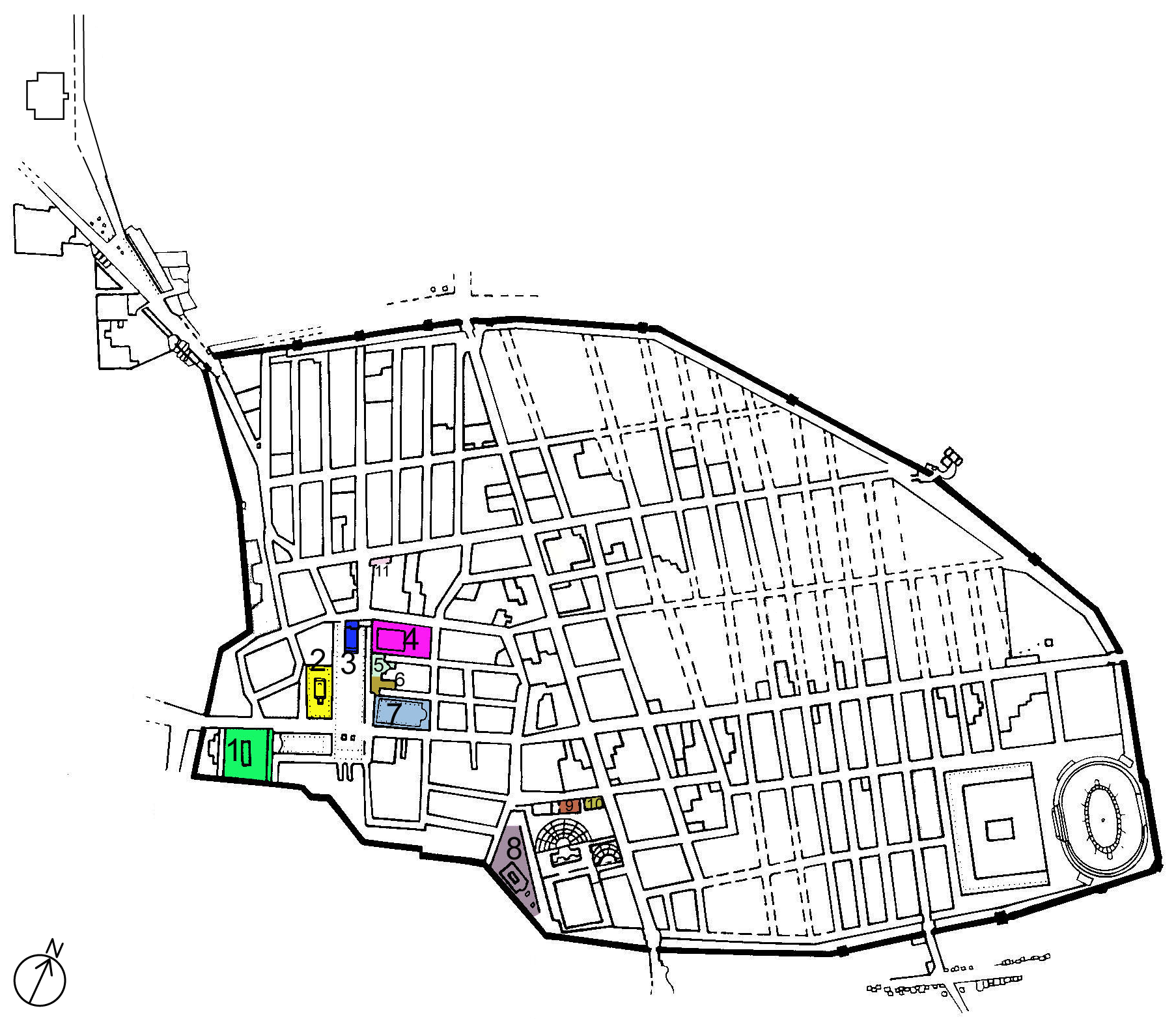 Plan von Pompeji mit eingezeichneten religiösen Bauten